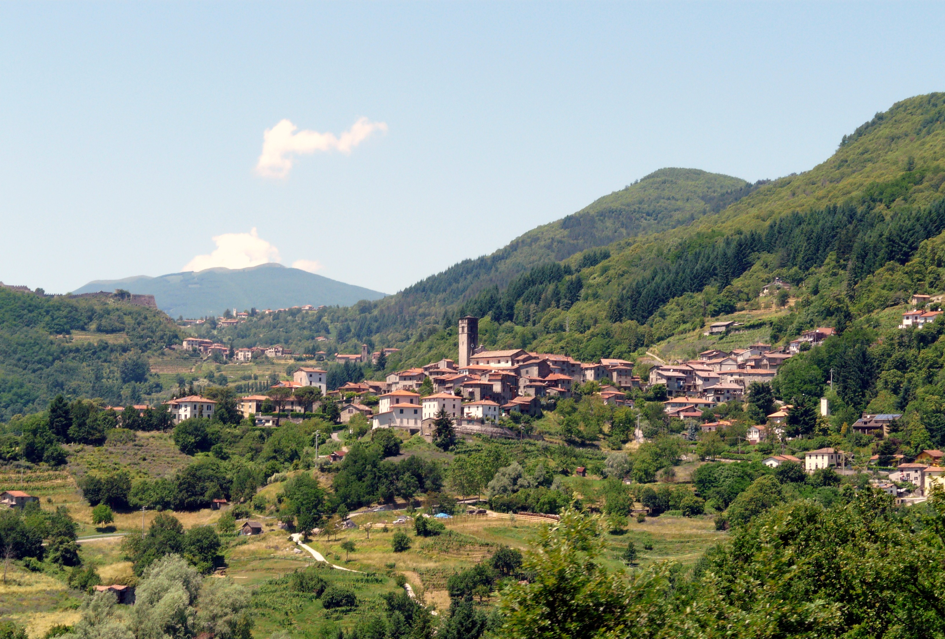 Panorama di San Romano in Garfagnana, Toscana, Italia